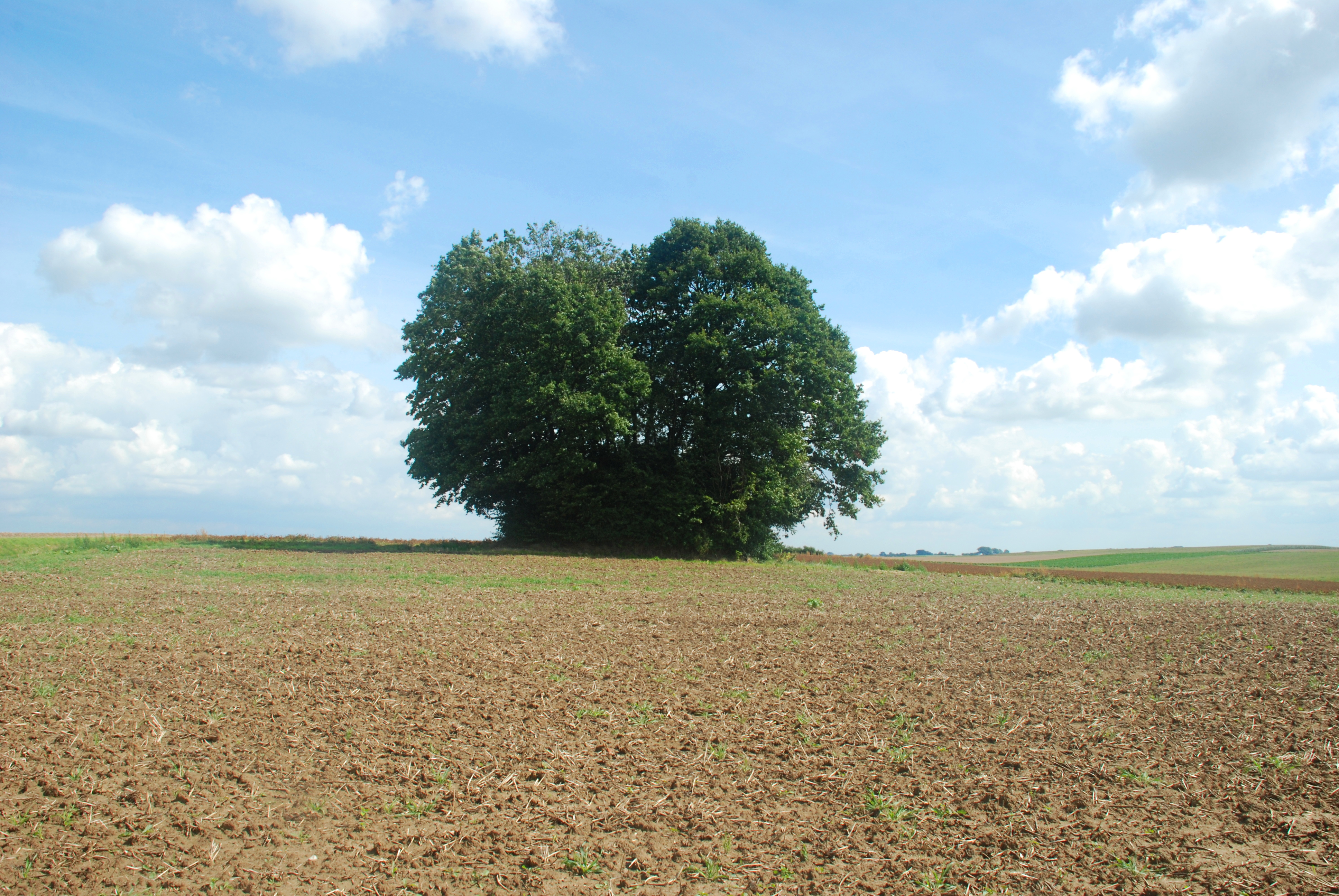 Belgique - Walhain - Tourinnes-Saint-Lambert - Tumuli de Libersart